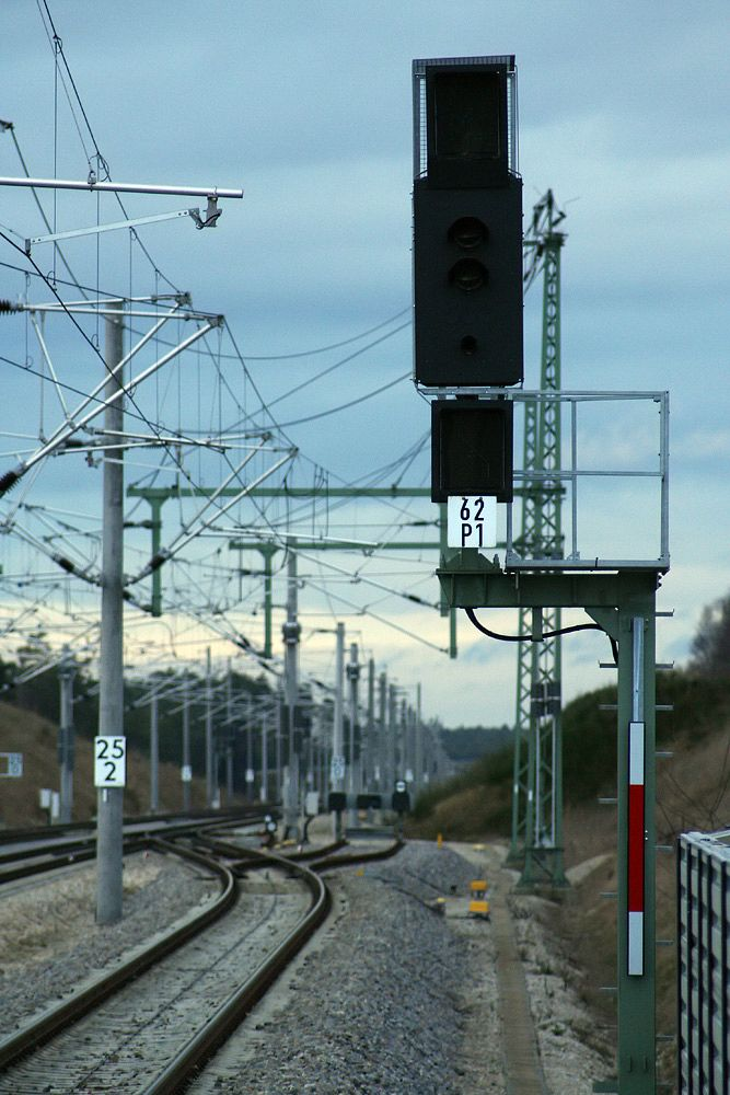 Ein dunkel geschaltetes Ks-Signal